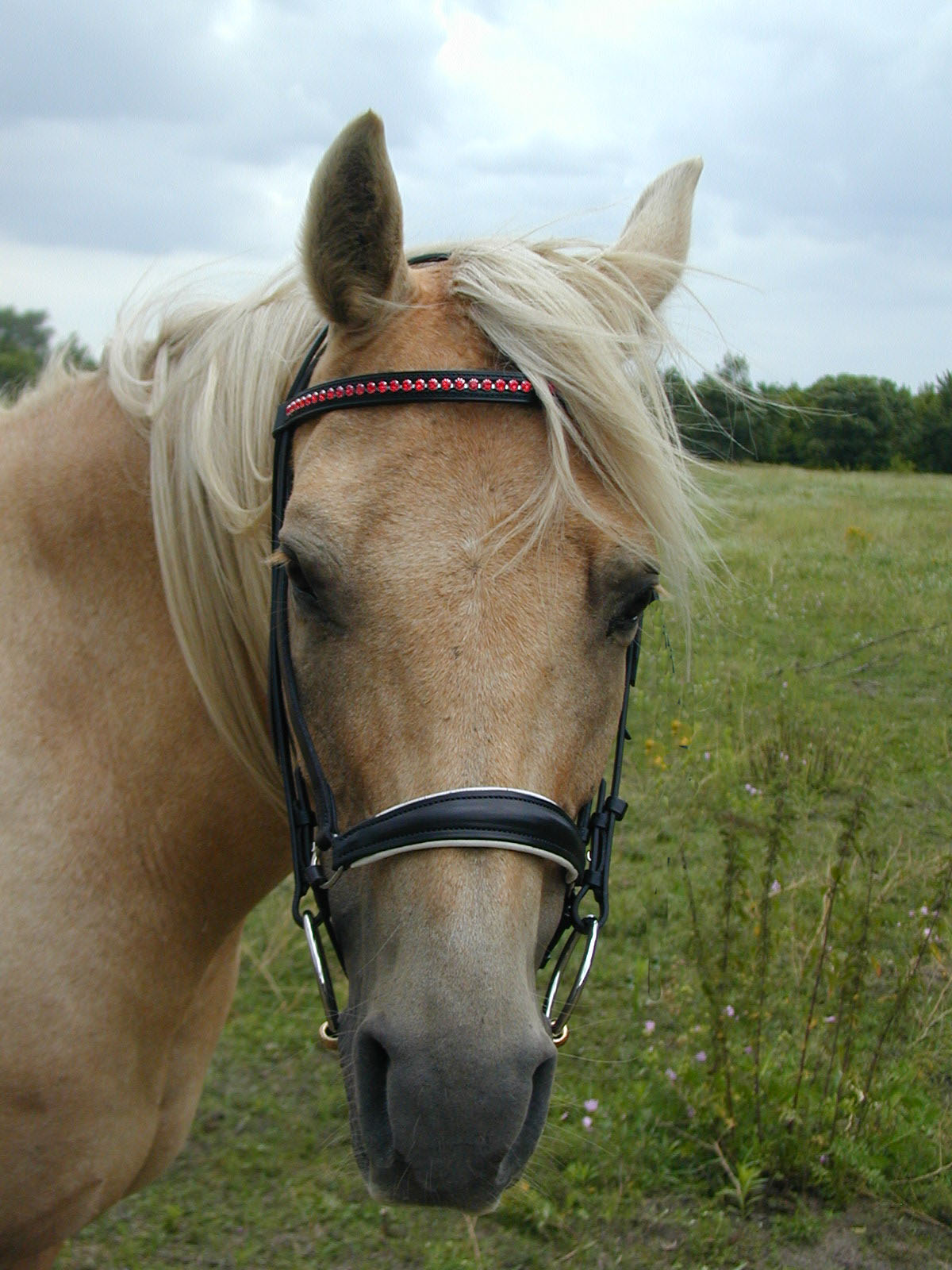 Hanoveranisches Reithalfter, englisch verschnallt an Araber-Welsh-Mix Stute in Isabell / Palomino